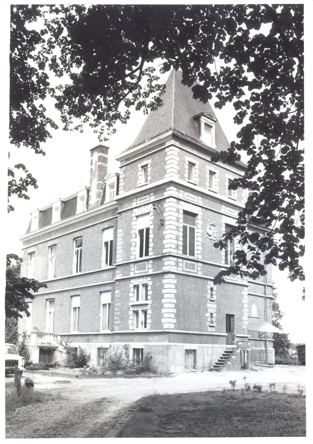 Destelbergen Destelbergen Dendermondse steenweg 608